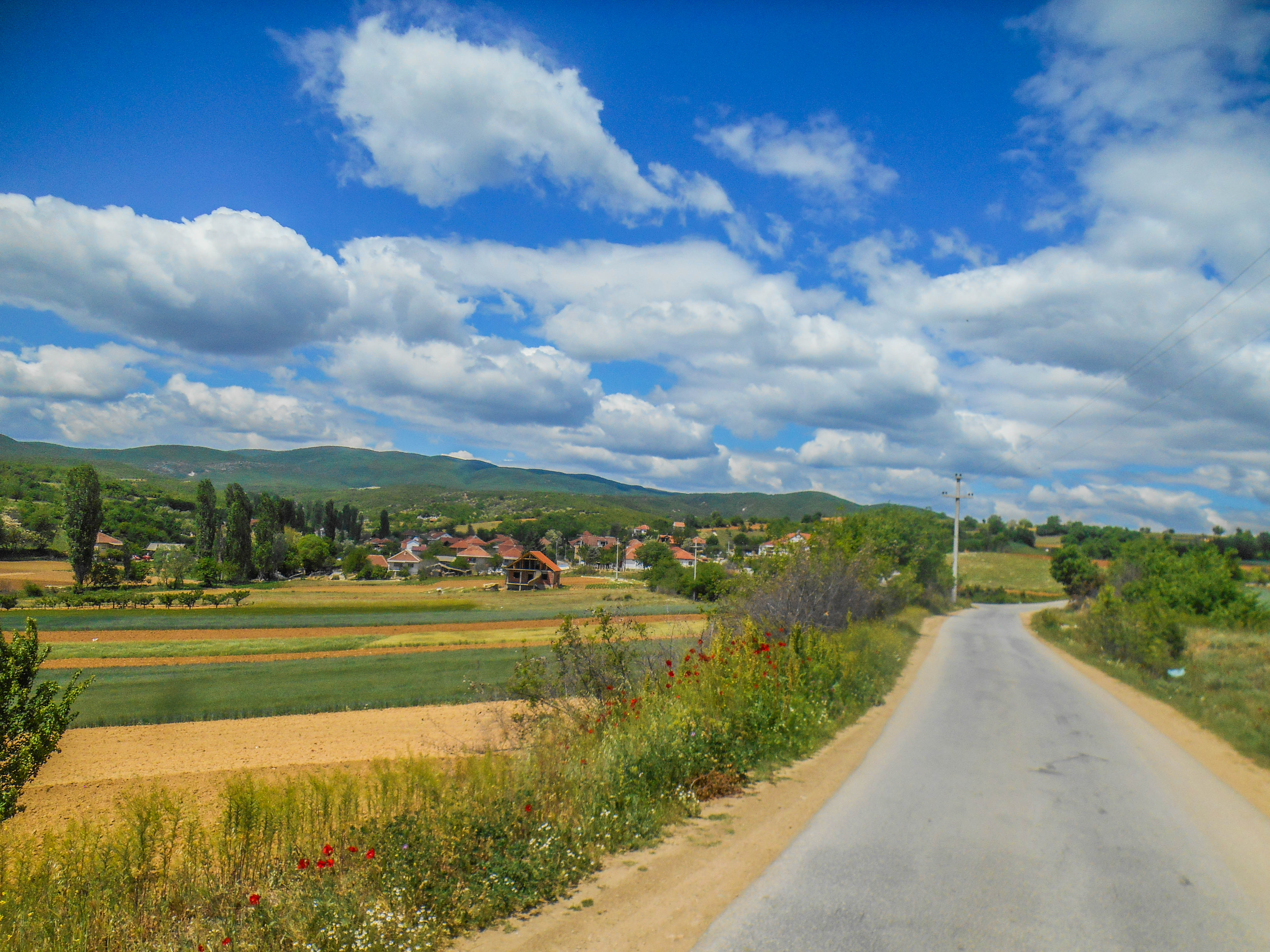 Едрениково